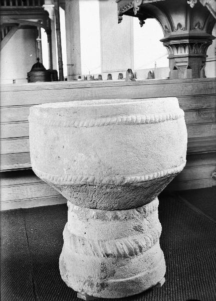 Dopfunt, 1200-talet. Kategori: (04) DopfuntarDopfunt, 1200-talet.